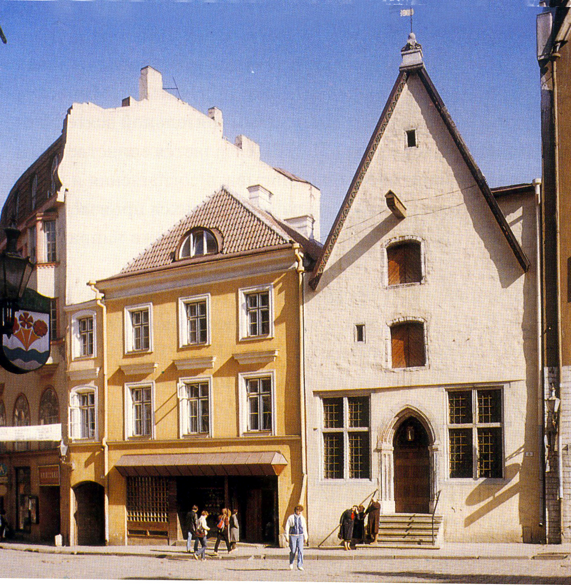 Kamienice zaadaptowane na zespół gastronomiczny Kafe Gnom w 1980 r. przez gdańskich konserwatorów zabytków